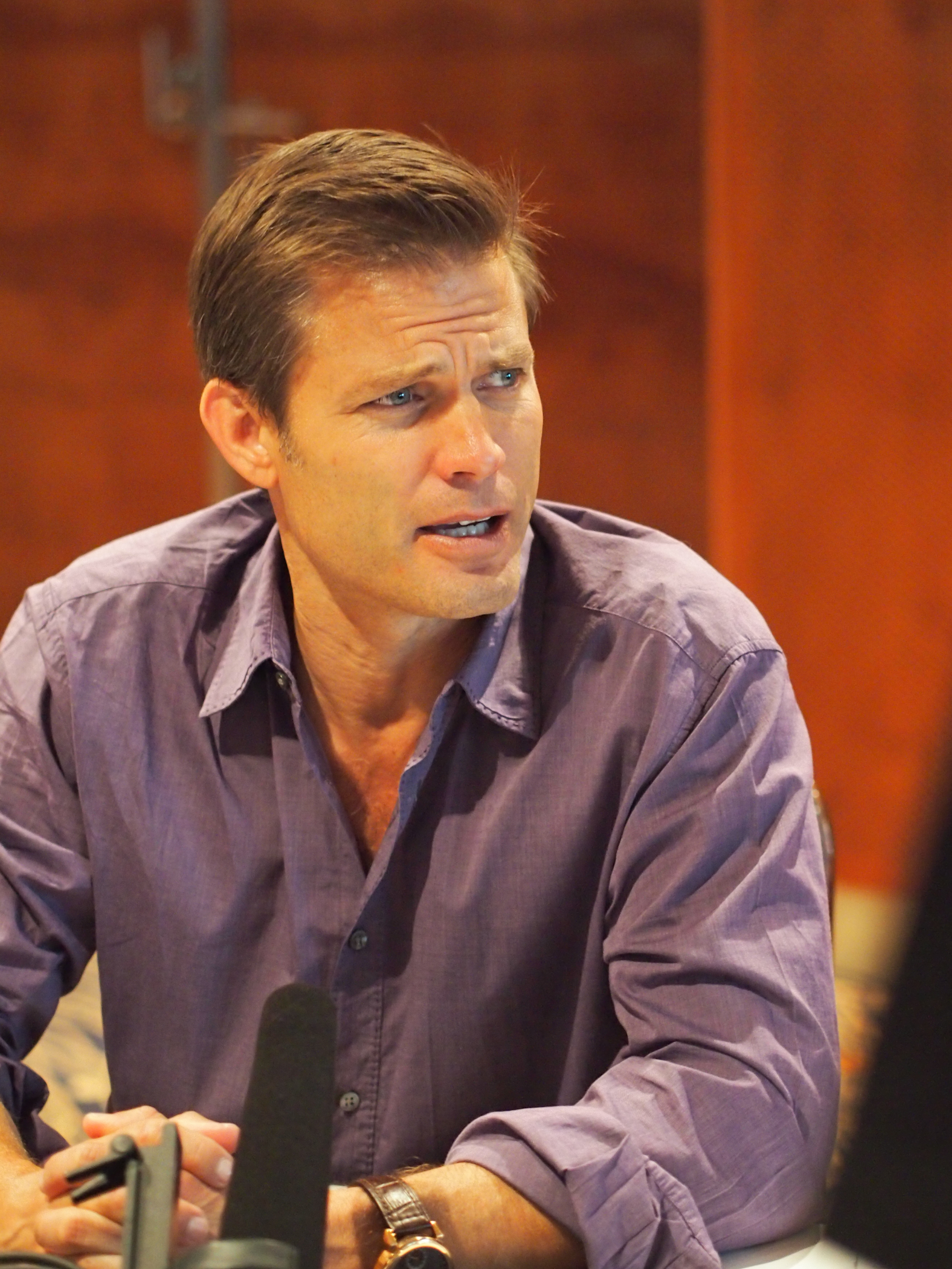 Casper Van Dien